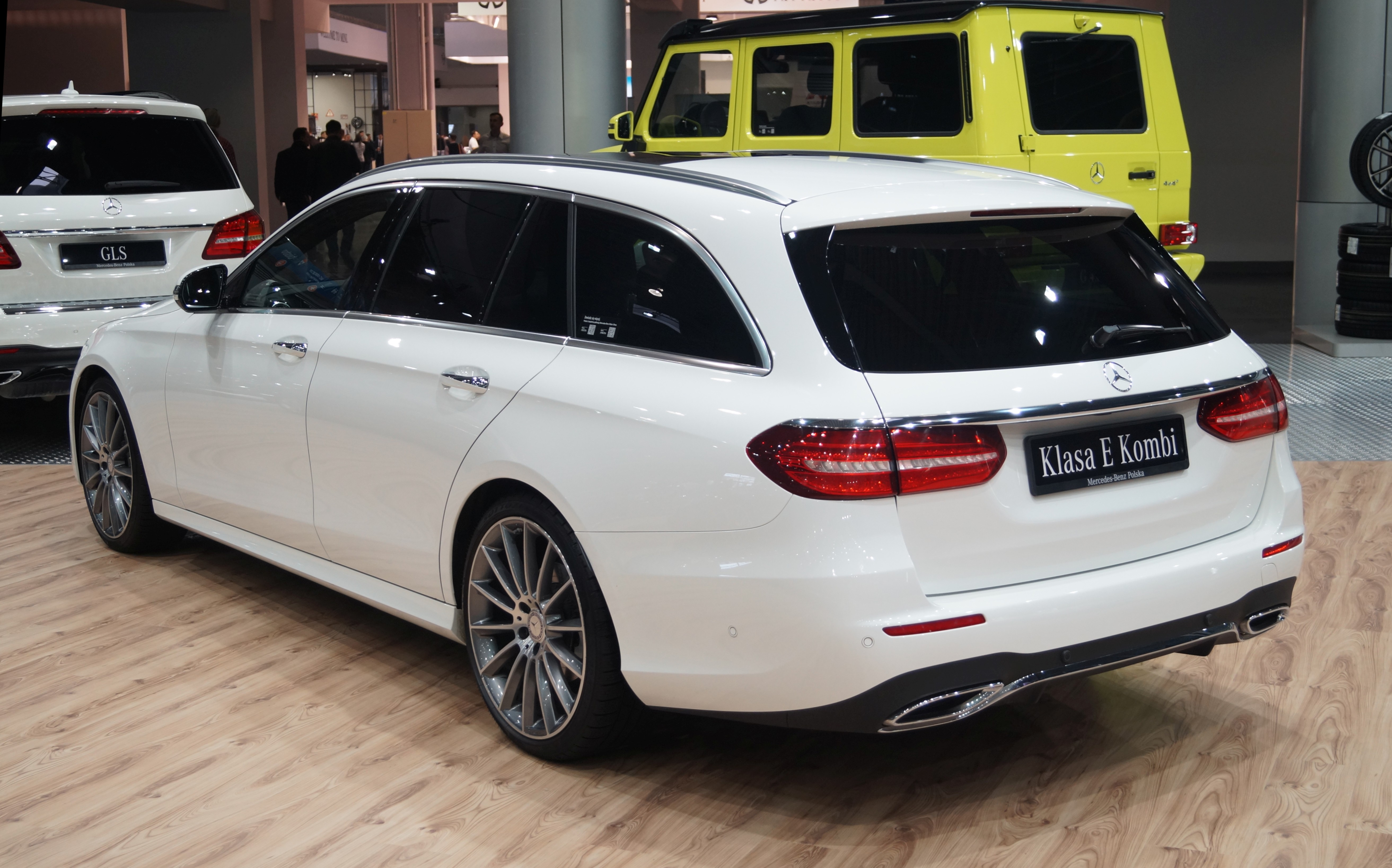 Lewy tył Mercedesa-Benz Klasy E Kombi (S213) na Motor Show Poznań 2017.